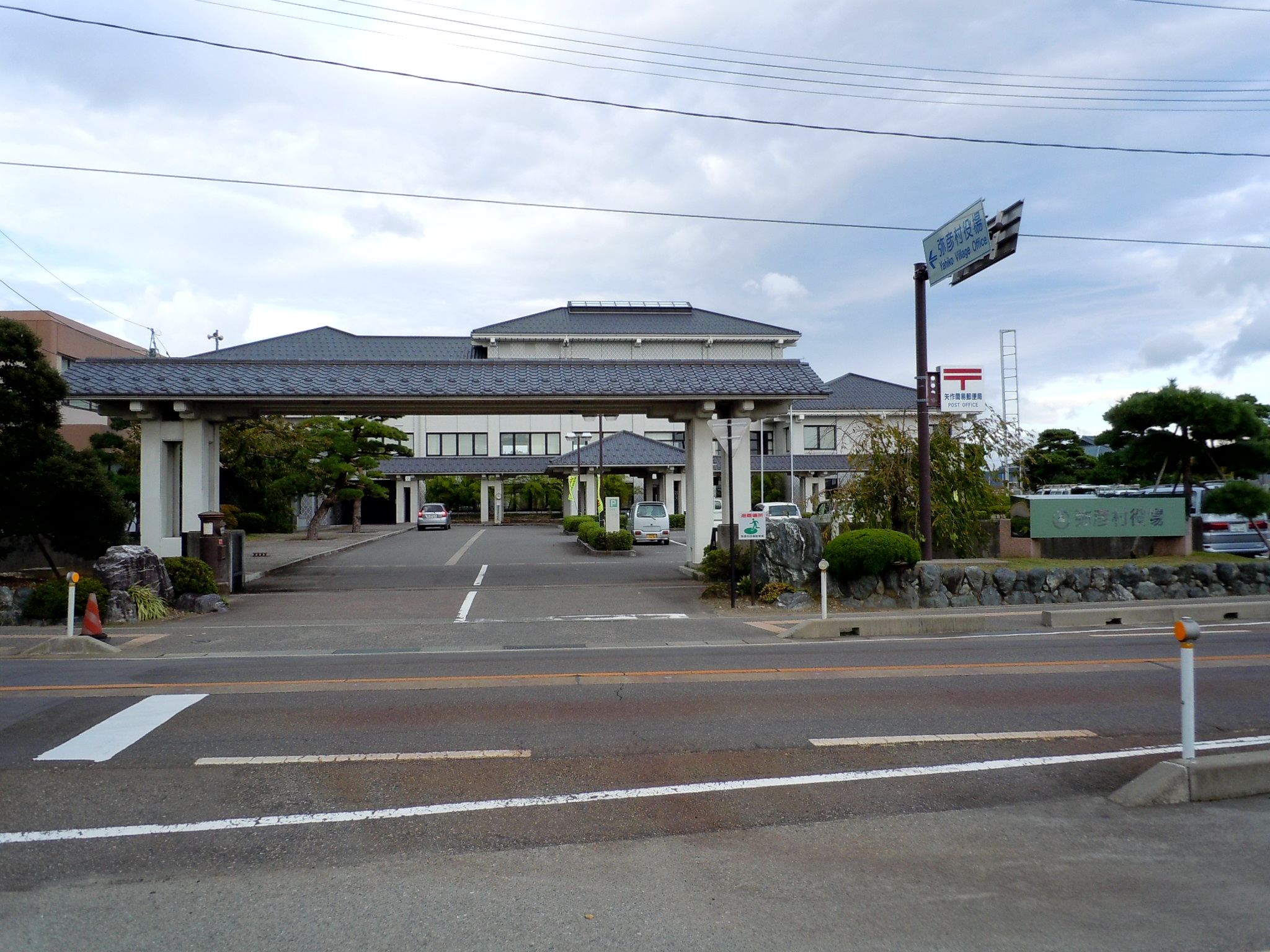 弥彦村役場